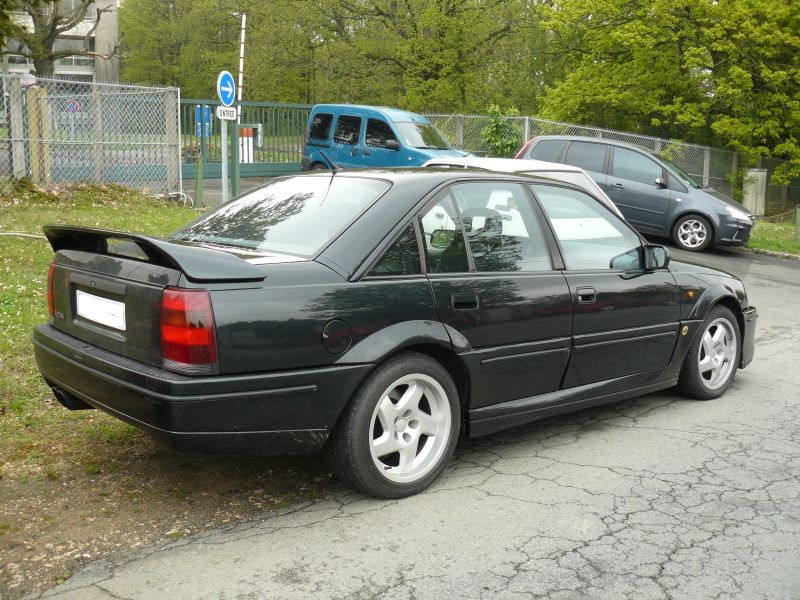 Français cadien: Montlhery avril 2012